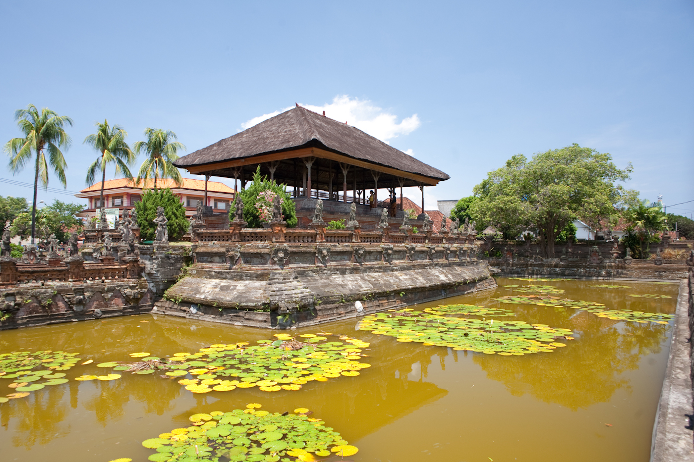 Der Palast von Klungkung auf Bali